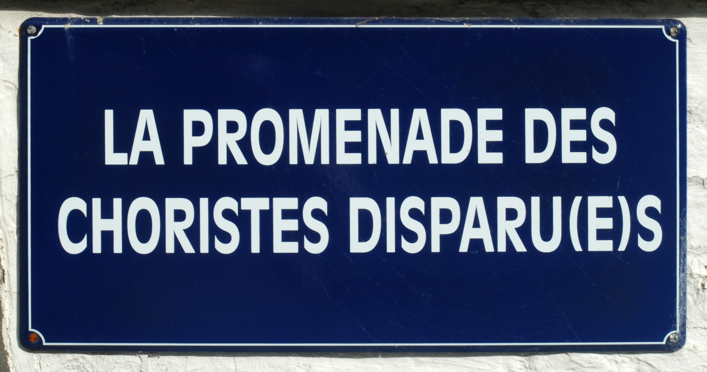 Belgique - Brabant wallon - Court-Saint-Étienne - Église Saint-Étienne